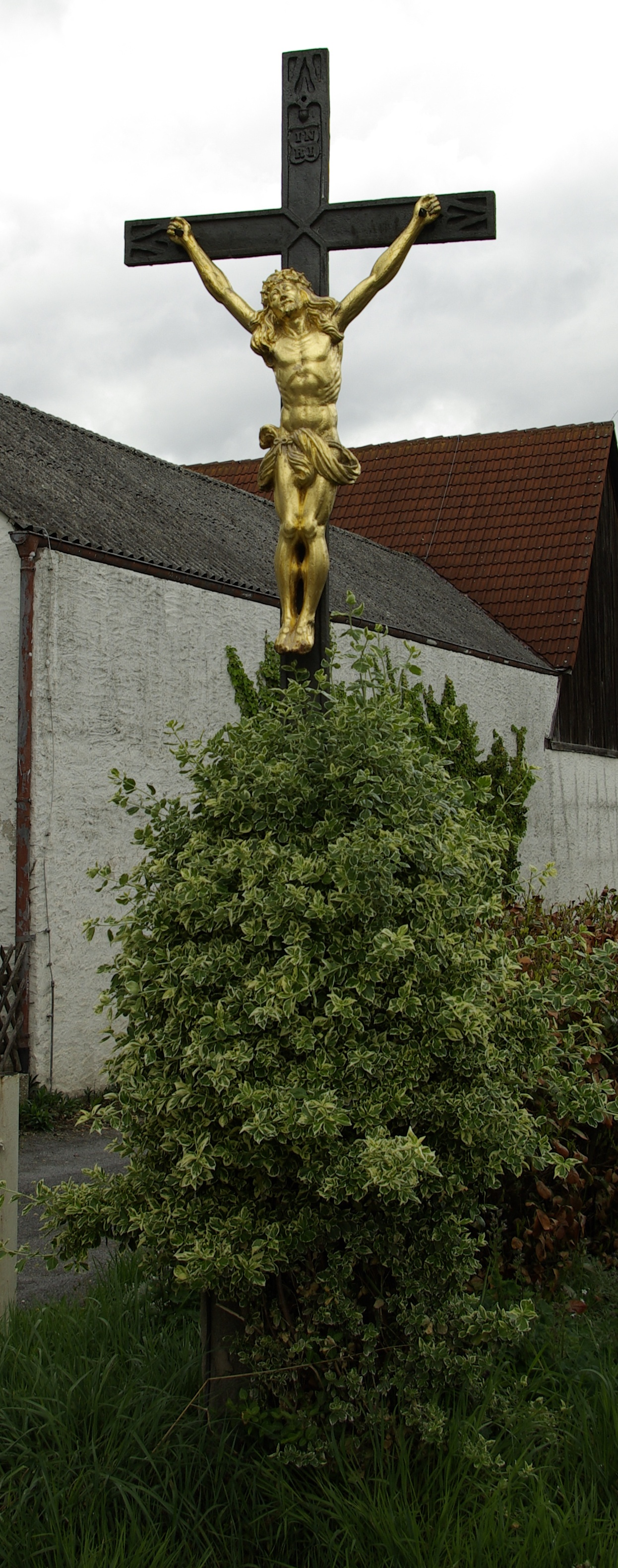 Wegkreuz im Erlanger Stadtteil Steudach